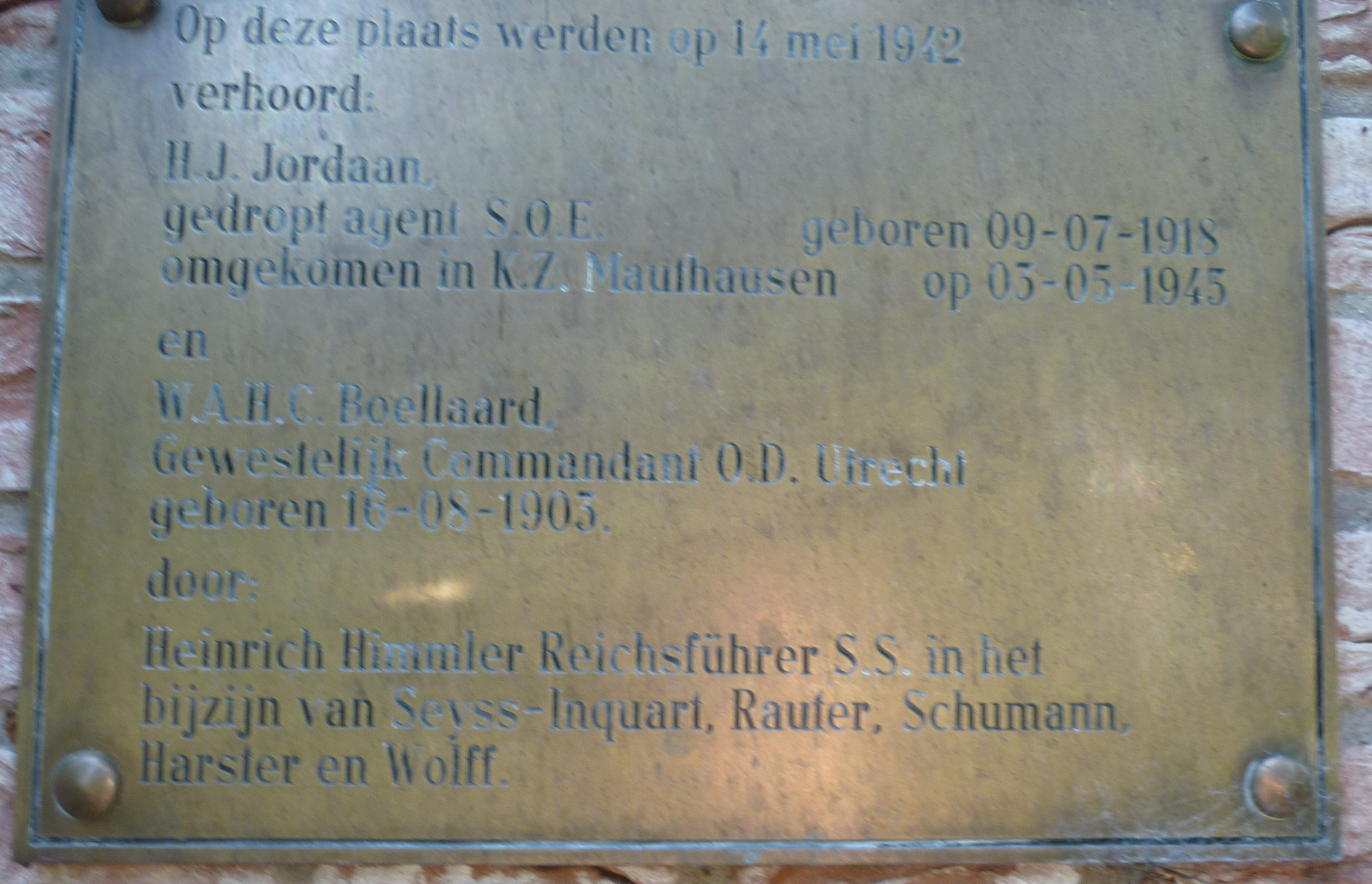 Clingendael: plaquette in de gemeente Den Haag voor Han Jordaan en Pim Boellaard